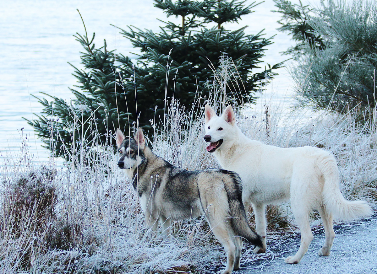 Femelle (à gauche) et mâle (à droite) inuits du Nord